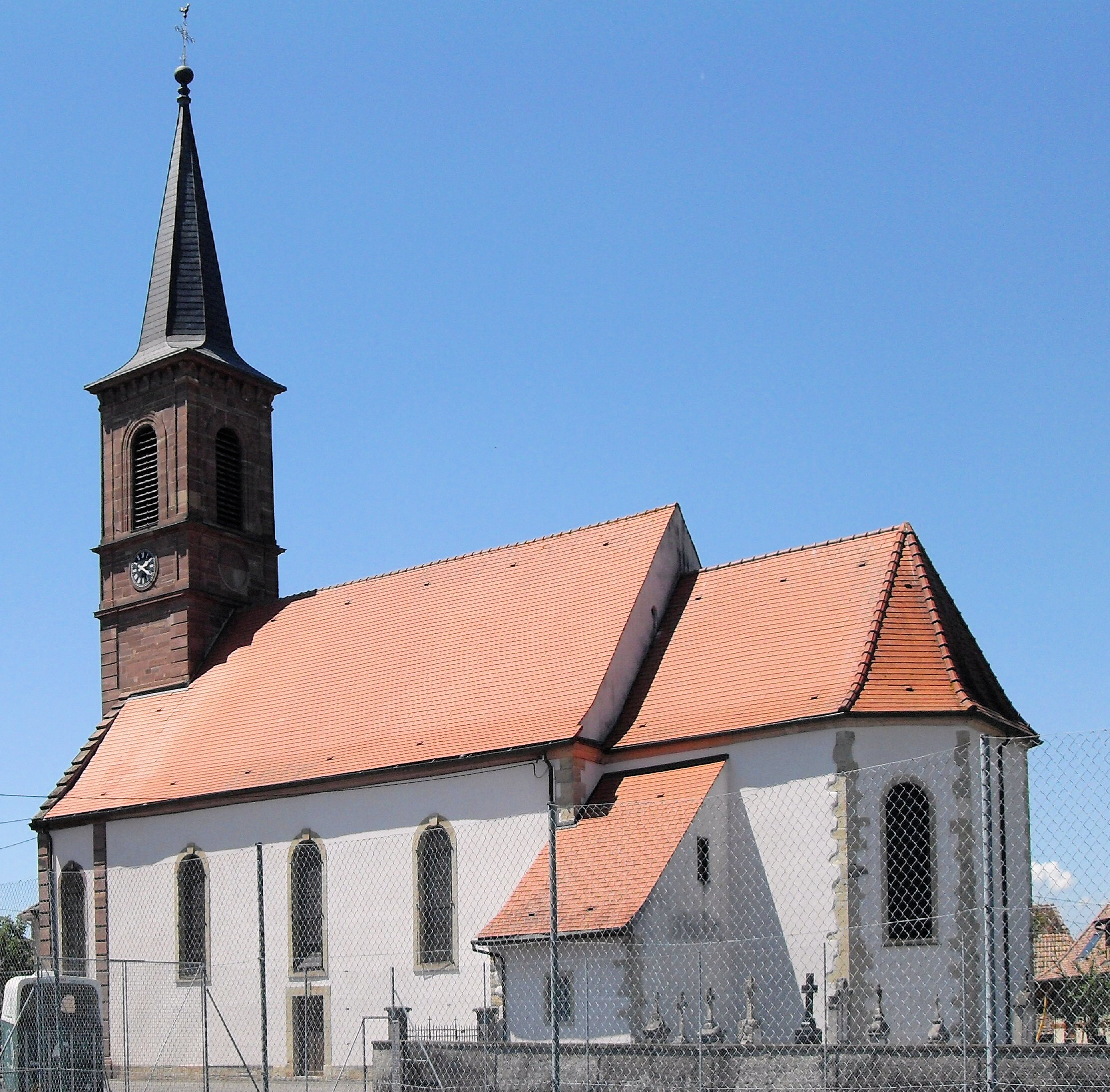 L'église Saint-Sylvestre d'Altenach